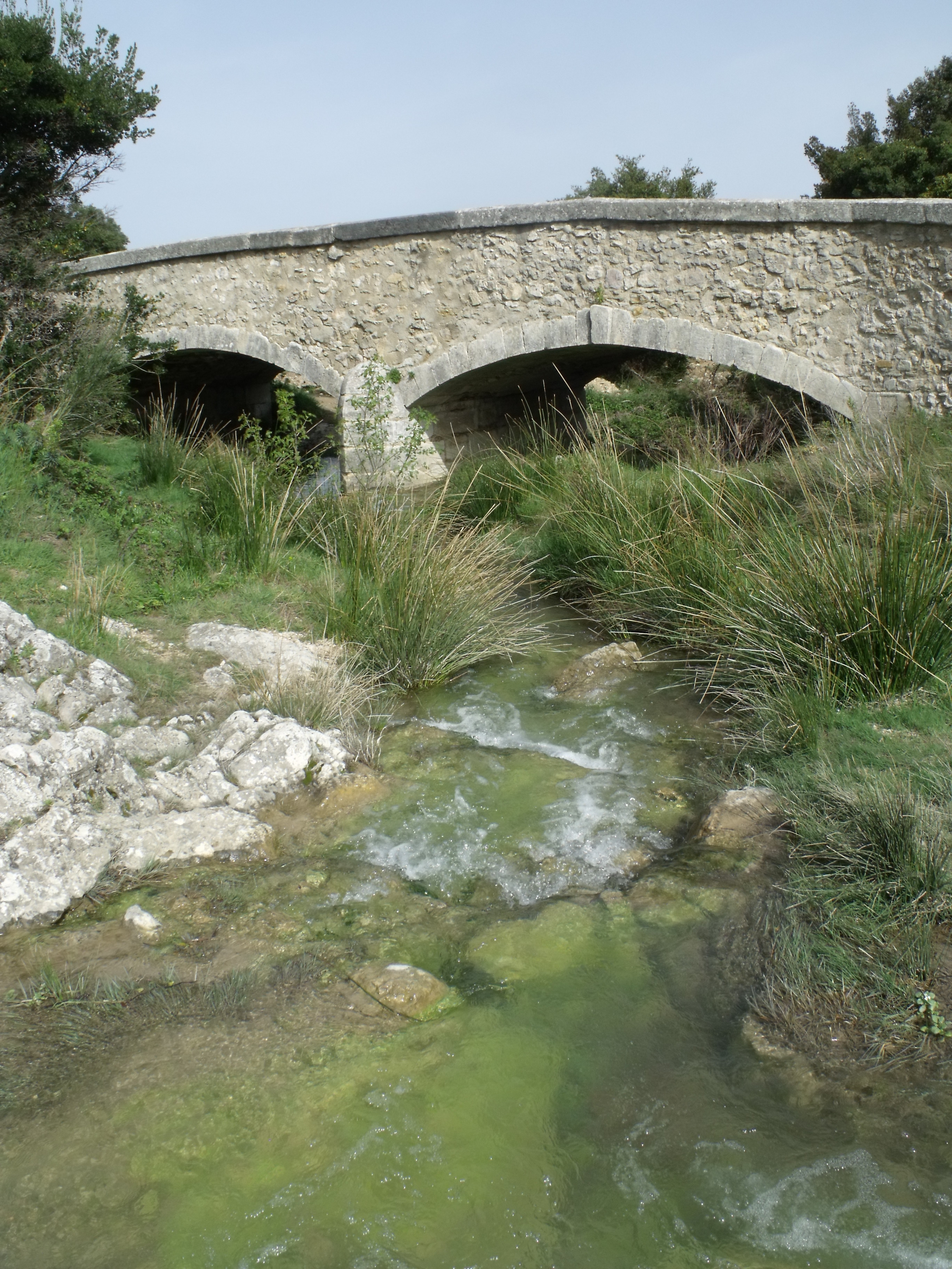 Gaudre de Romanin au guet du Calan de Rousset, Saint-Rémy-de-Provence (13)